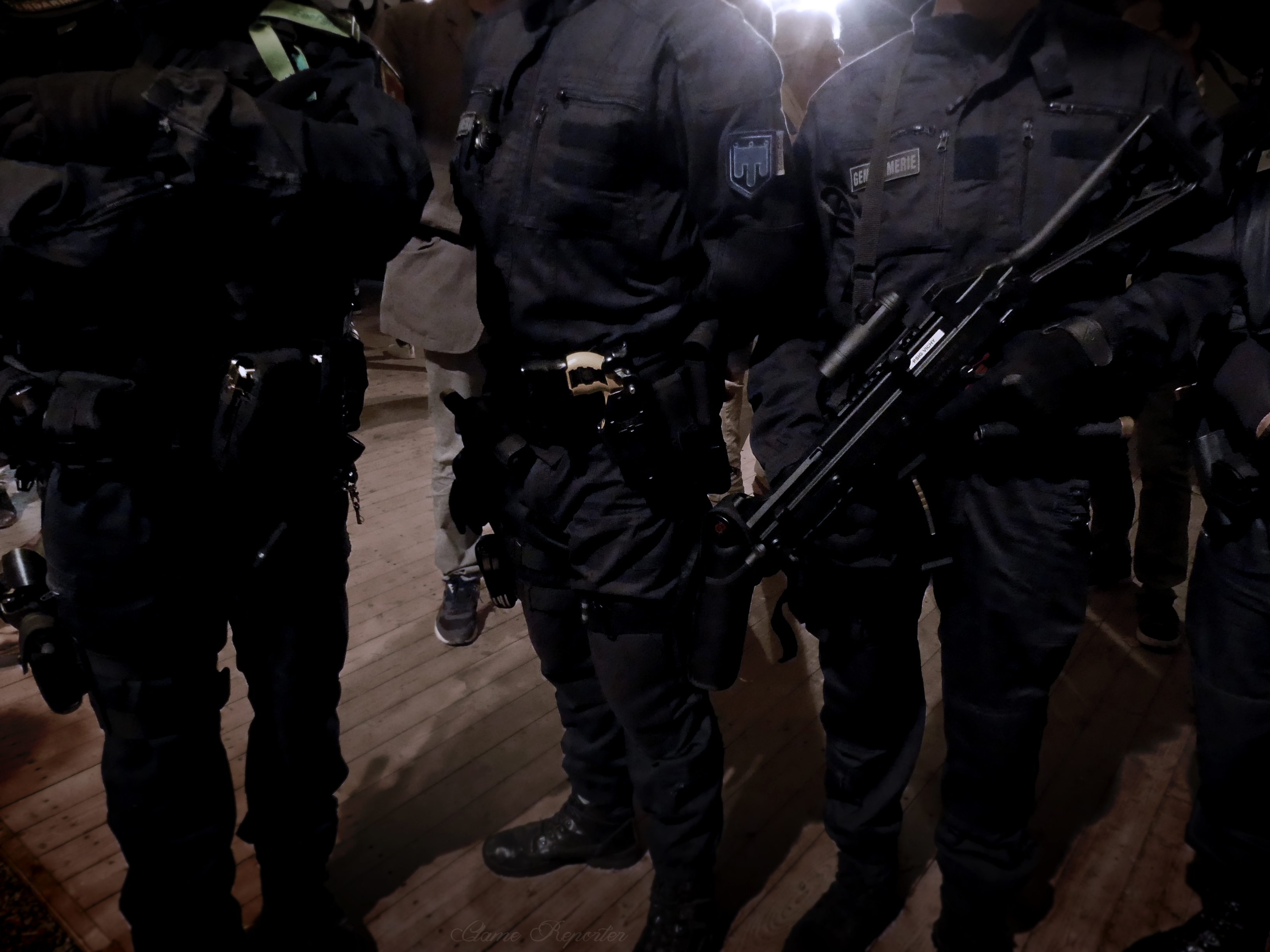 Patrouille de Gendarmerie Nationale assurant la sécurité d'une festivité en contexte de l'état d'urgence et du plan Vigipirate renforcé. Les hommes sont ostensiblement armés pour éloigner d'éventuels malfaiteurs et pour répondre à tout type de menace.